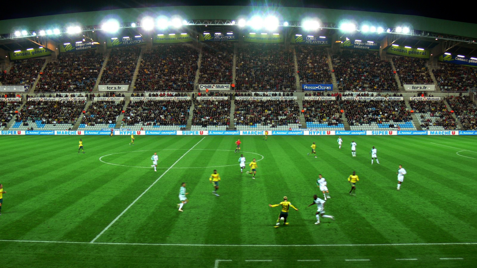 Stade de la Beaujoire: FC Nantes | AS Saint-Etienne